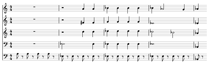 Modulation im Confutatis des Mozart-Requiem, Takt 26ff